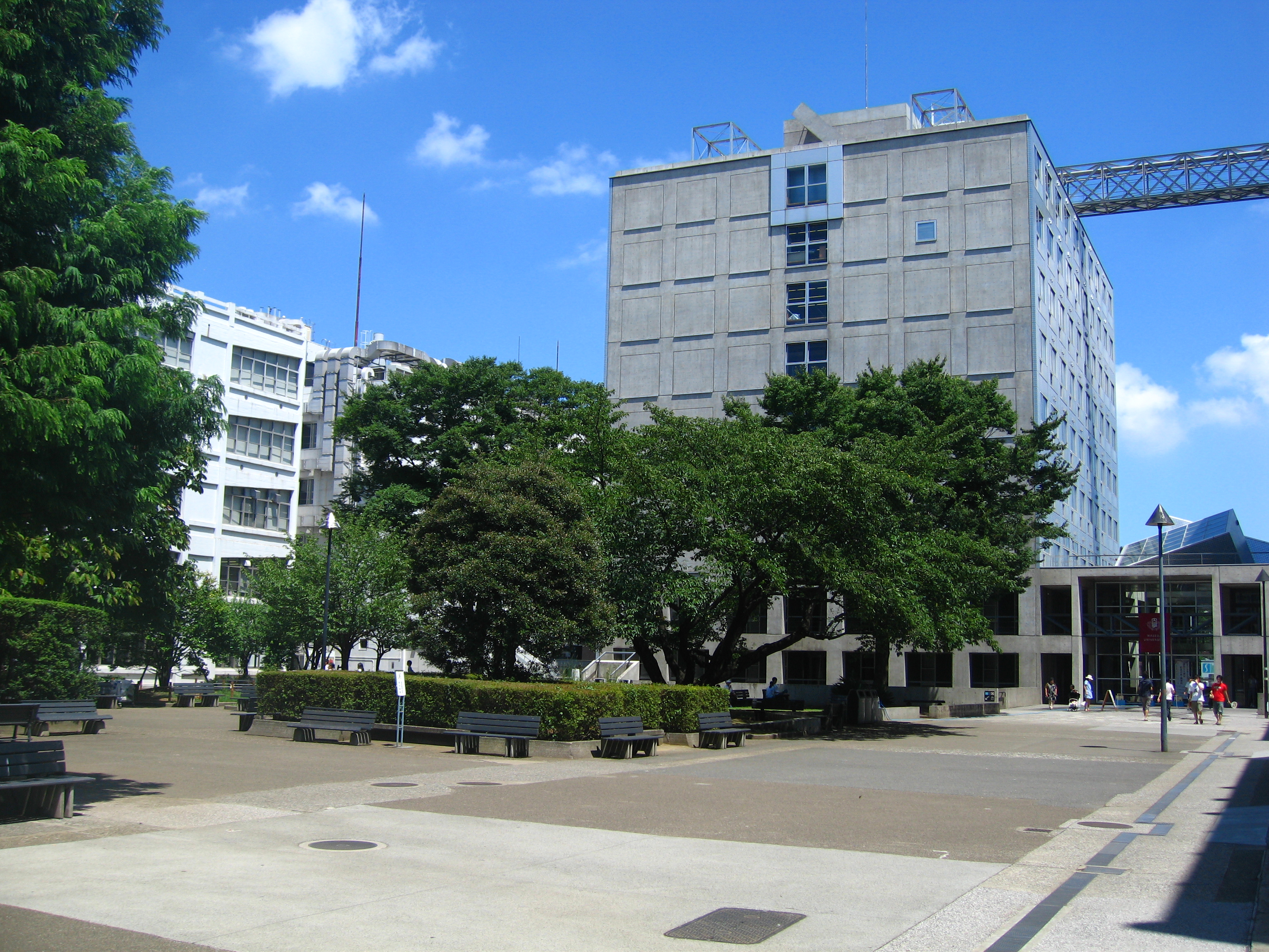 早稲田大学 西早稲田キャンパス 55号館N棟 (Nishi-Waseda Campus)